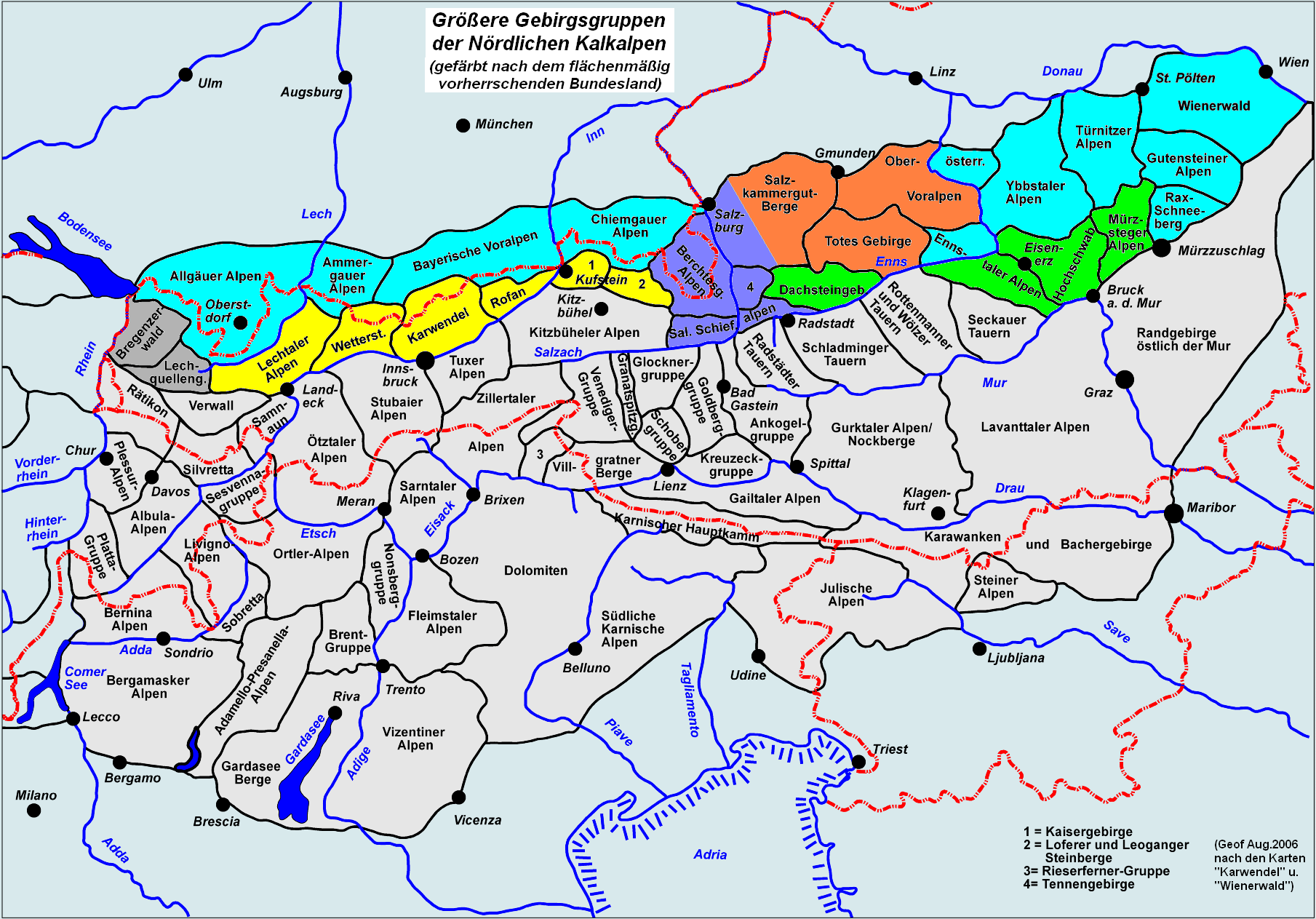 Die wichtigsten Gebirgsgruppen der Nördlichen Kalkalpen, eingefärbt nach dem flächenmäßig vorherrschenden Bundesland